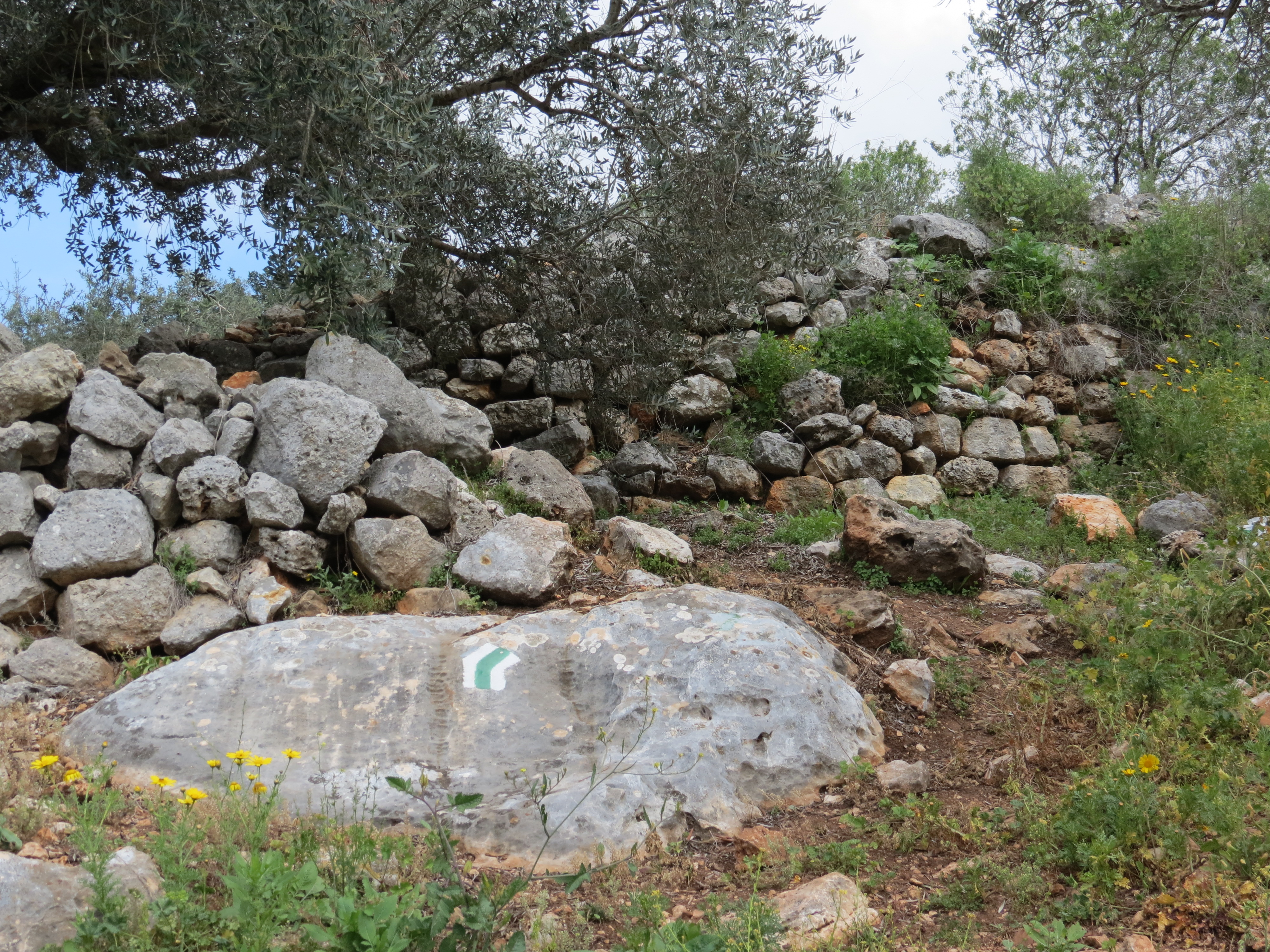 חורבת מחוז